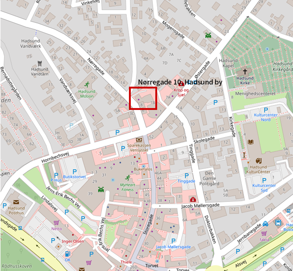 Kort med Nørregade 10 markeret. Kortet hørere til Drabssagen i Hadsund foretaget 11. november 2018.